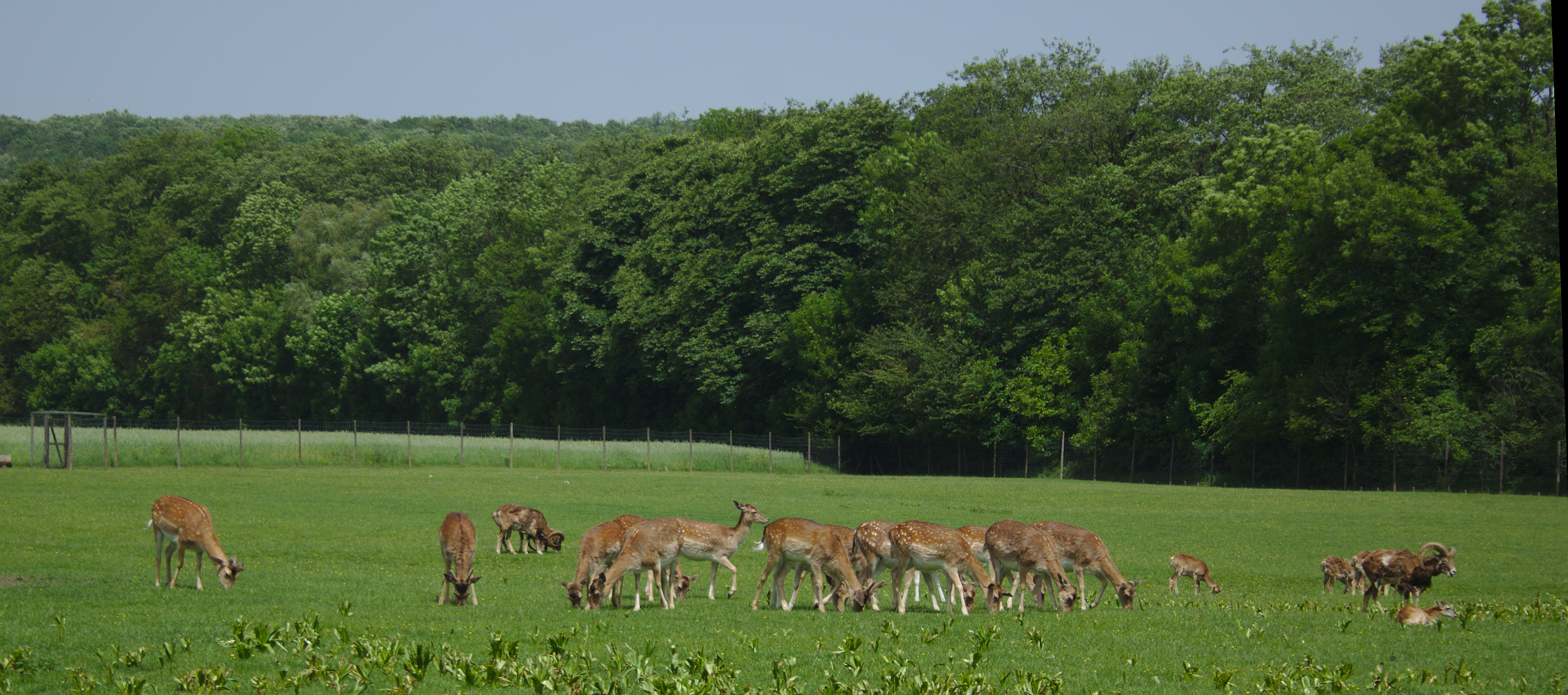 Lainzer Tiergarten This media shows the nature reserve in Vienna with the ID 1.